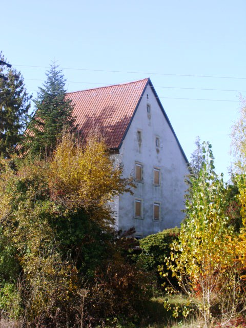 Schloss, Schloßgasse 5, Schwarzach-Gerlachshausen, zweigeschossiger Massivbau mit Frackdach, teils mit profilierten Fensterrahmungen, 17. Jahrhundert, im Kern wohl älter; D-6-75-165-11